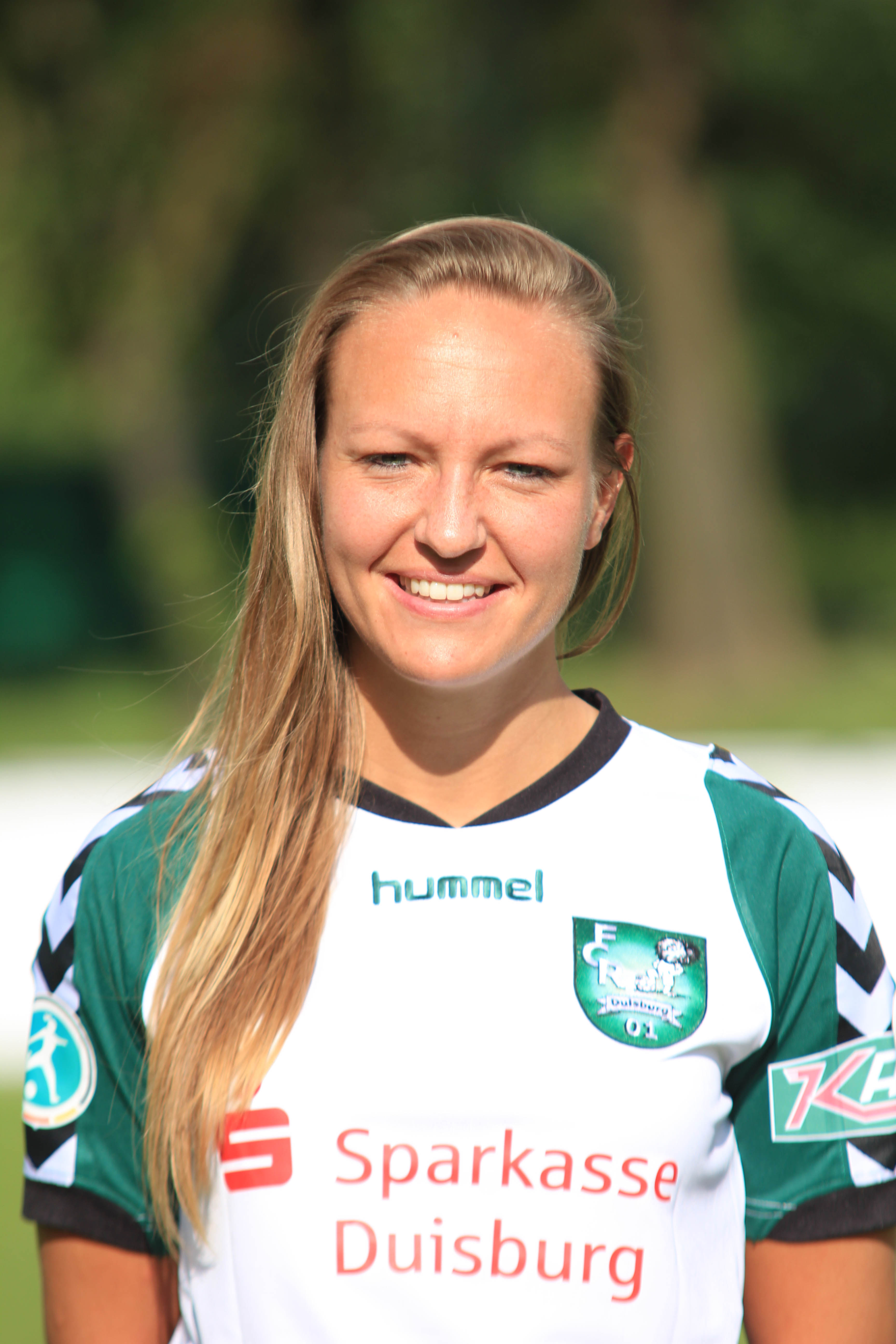 Elena Hauer, FCR 2001 Duisburg